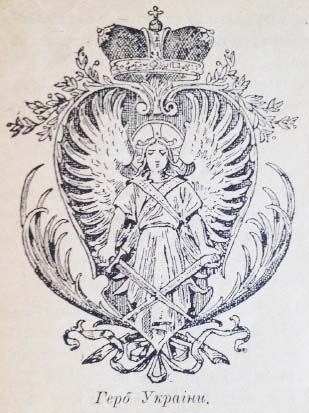 Герб України згідно уявлень 1917 року